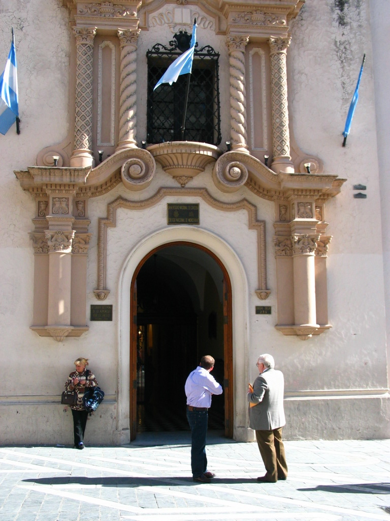 Entrada del Colegio Nacional de Monserrat. Córdoba, Argentina.